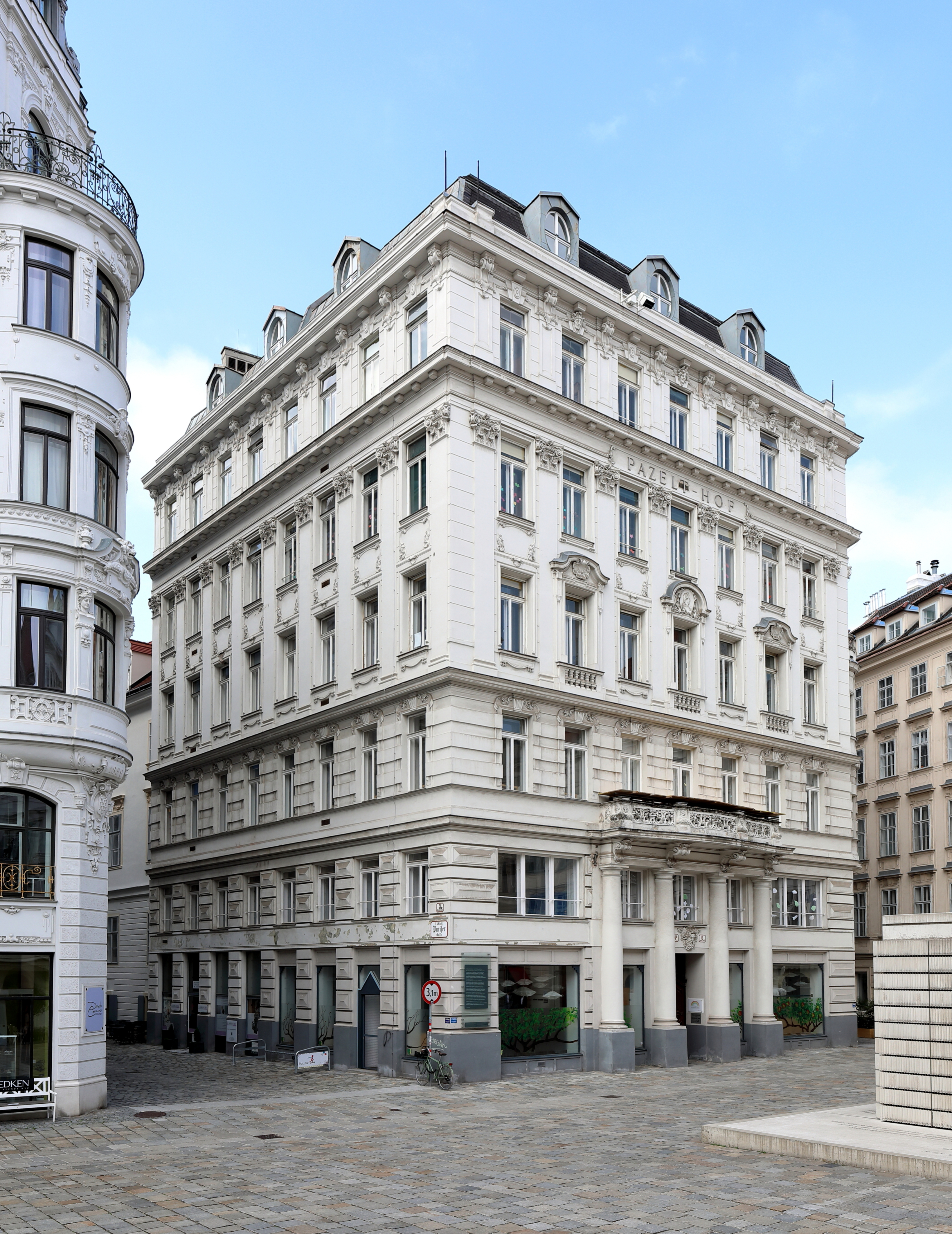 Der Pazelt-Hof an der Adresse Judenplatz 6 im 1. Wiener Gemeindebezirk Innere Stadt. Das Gebäude im späthistoristischen Stil wurde 1900 nach Plänen des Architekten Wilhelm Jelinek erbaut. In den Jahren 1919 bis 1923 befand sich hier das von Rabbiner Zwi Perez Chajes gegründete erste jüdische Realgymnasium Wiens. Seit Anfang der 1930er Jahre wird es als katholische Privatschule genutzt.